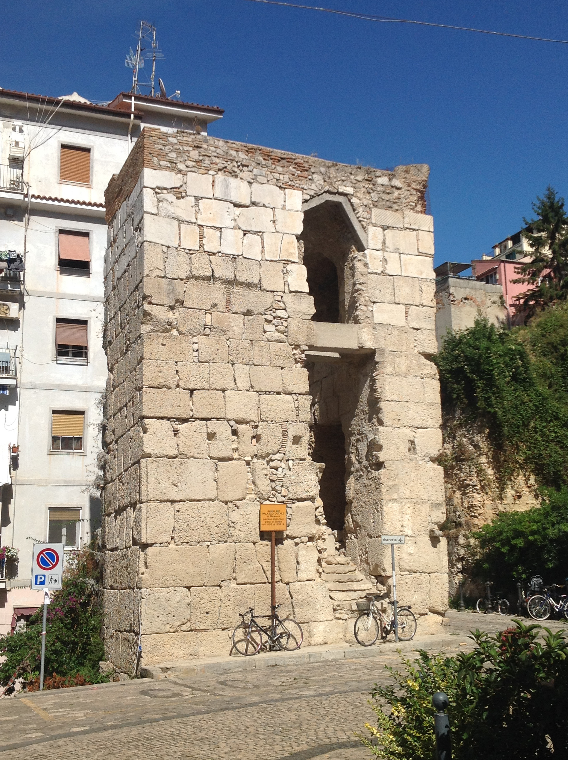 Ruderi della torre del palazzo ducale di Giovanni I.